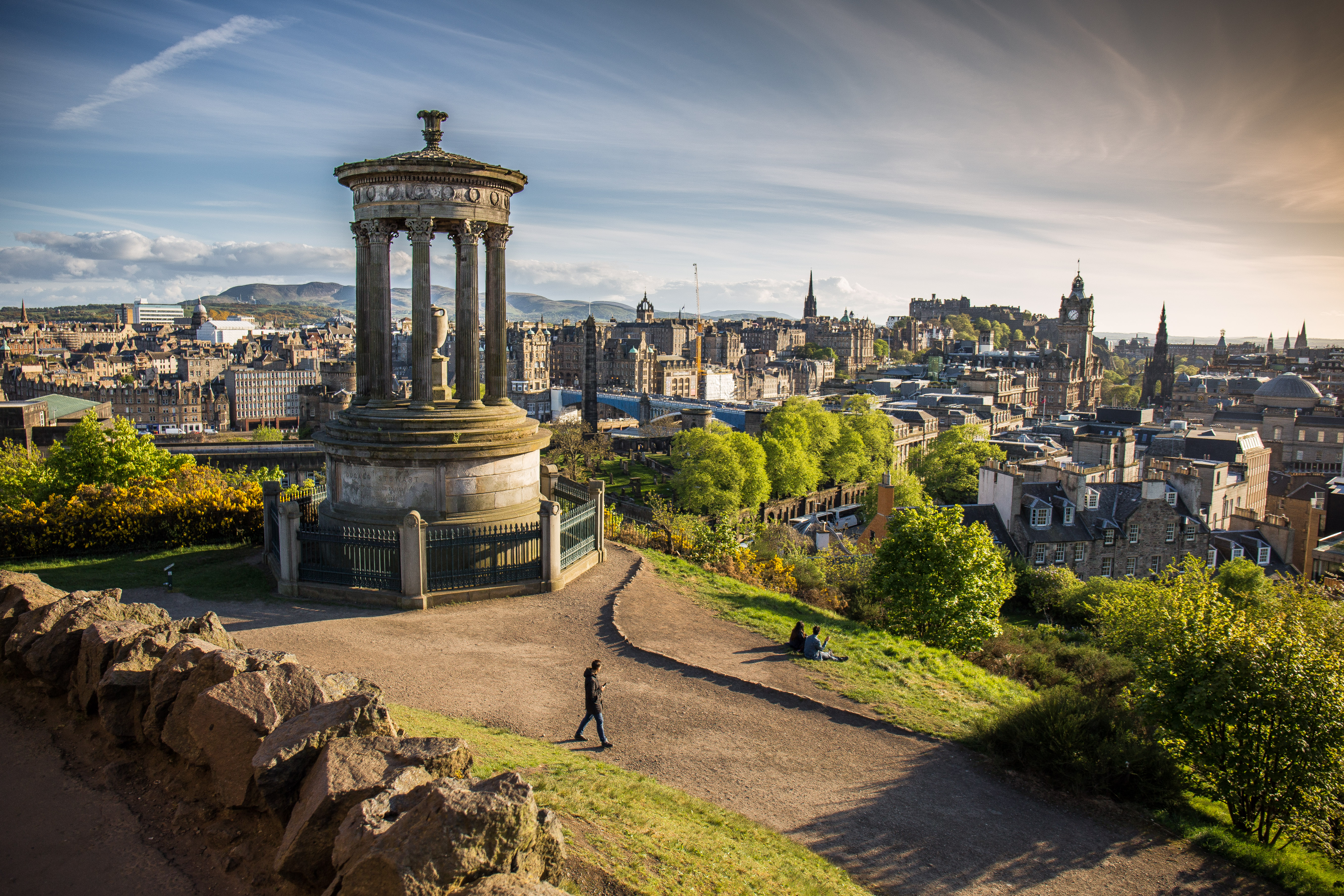 Edimbourg / Edinburgh vu de Calton Hill